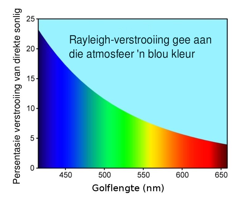 Rayleigh-verstrooiing